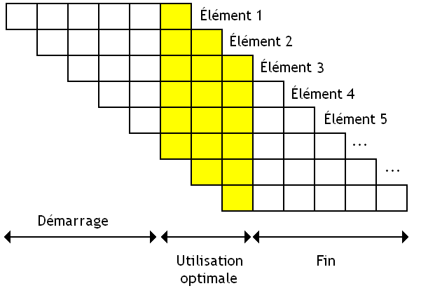 Illustration du temps de démmarage et du temps d'arrivée